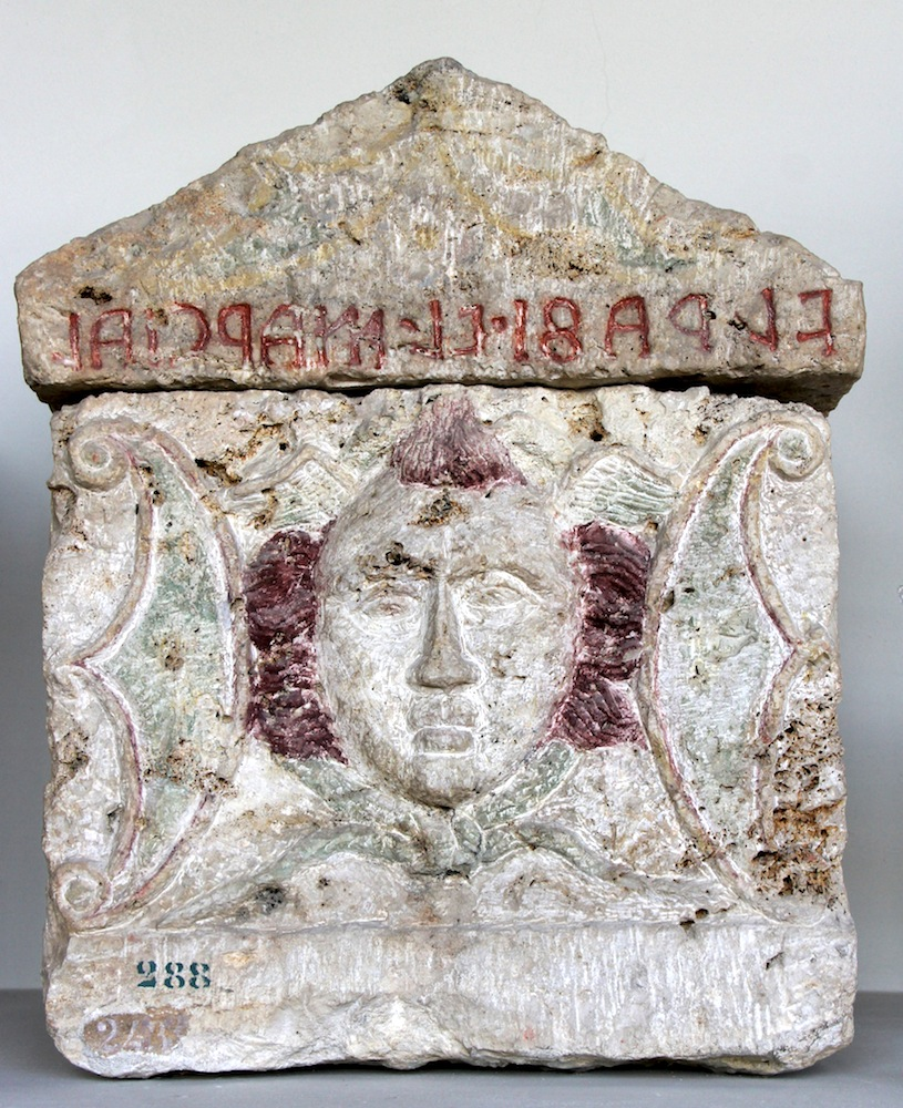 Tête de Méduse sur un sarcophage étrusque. Vers le IVe siècle av. J-C. Museo archeologico nazionale dell'Umbria